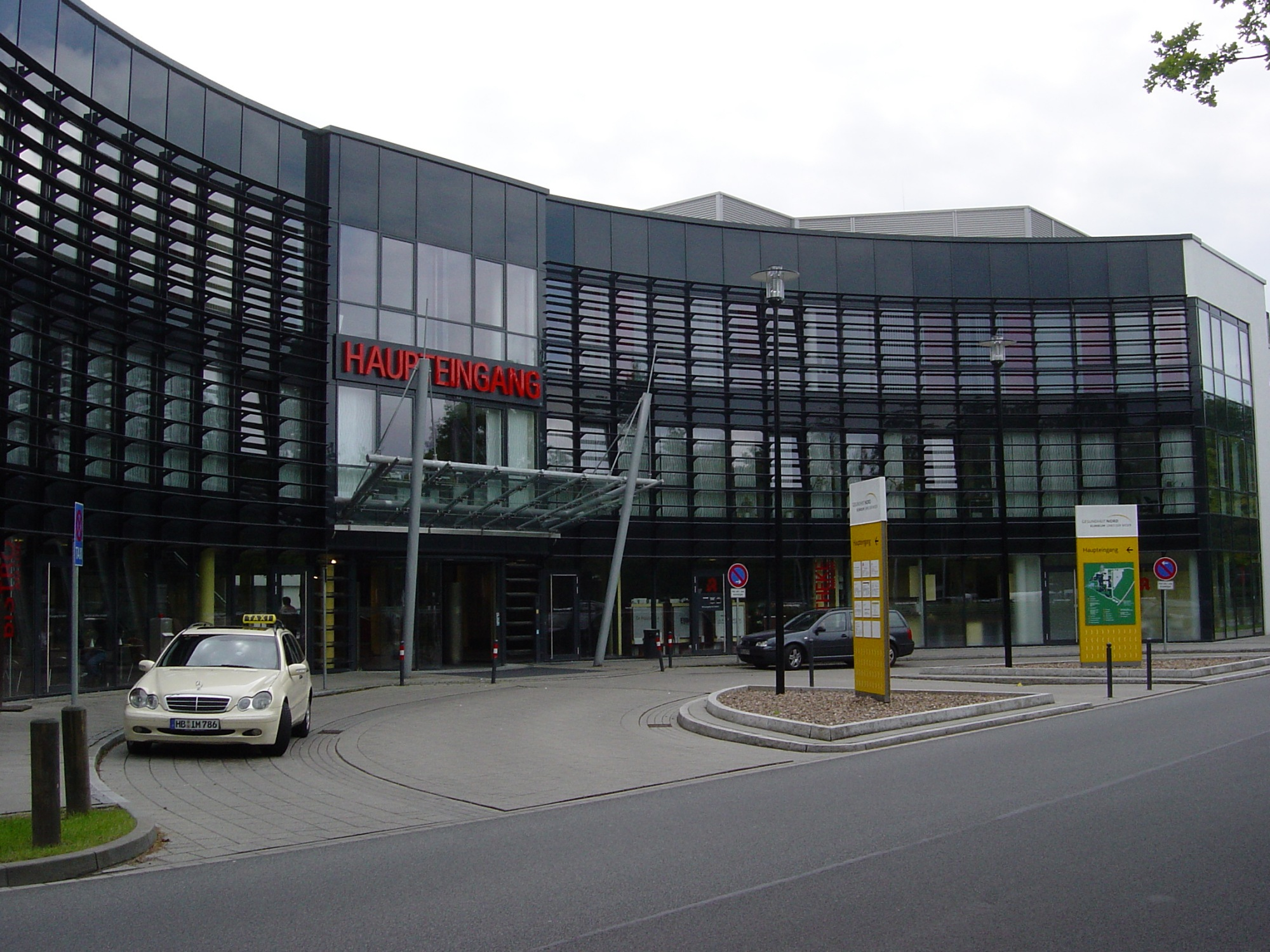 Klinikum Links der Weser (LdW), Senator-Weßling-Straße 1, 28277 Bremen